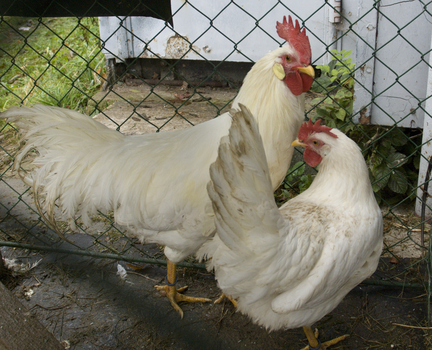 leghornka slepice s kohoutem